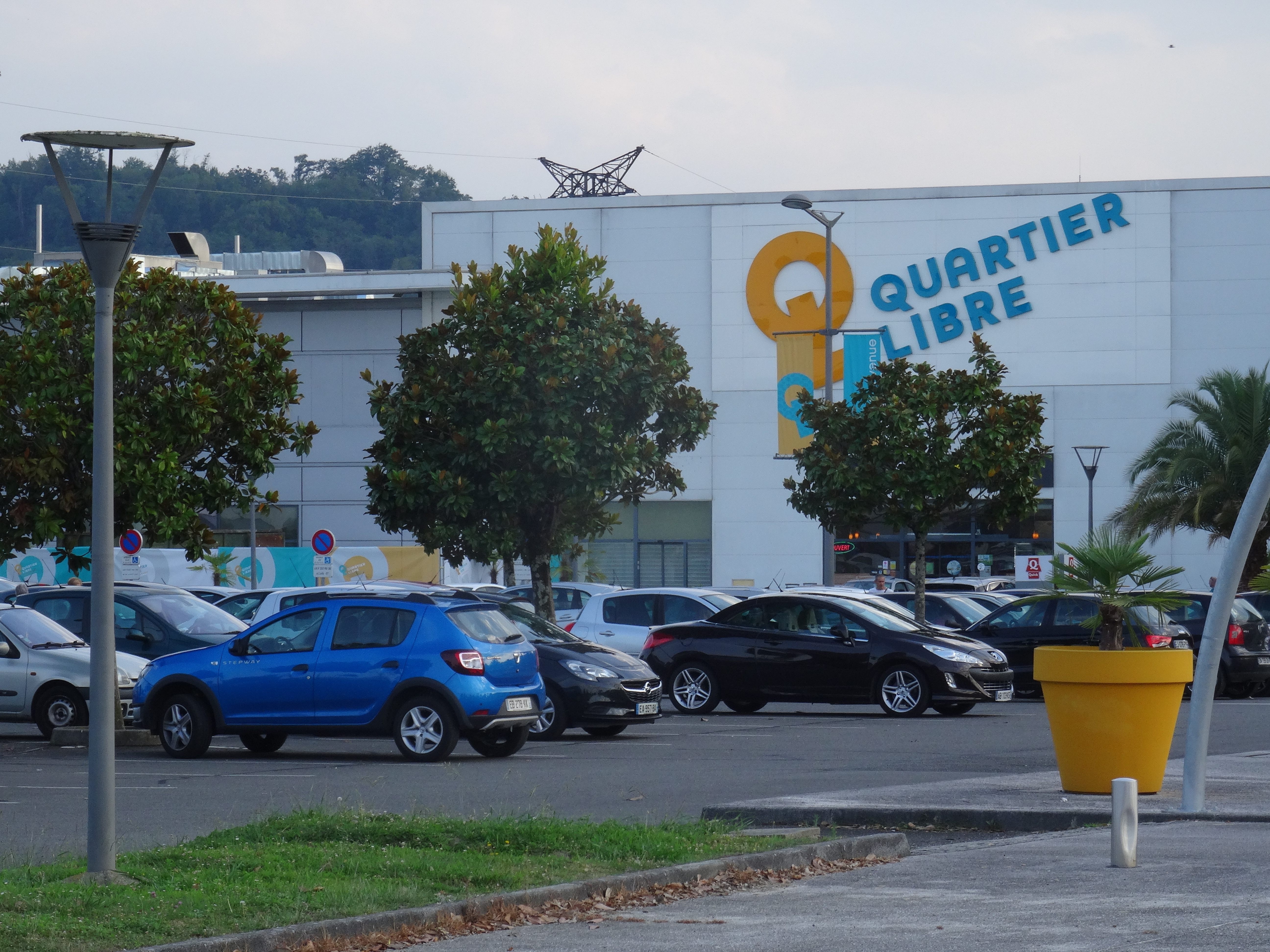 Le centre commercial Quartier Libre de Lescar.